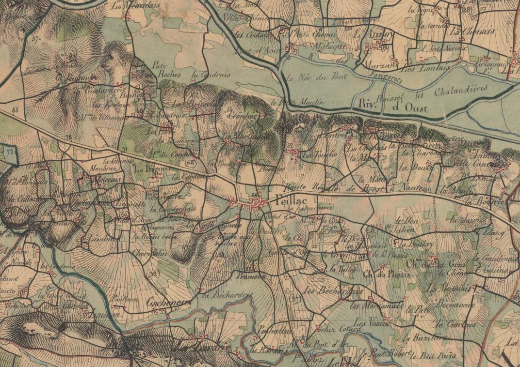 Vue générale de Peillac sur la cartes d'État major de 1820-1866.